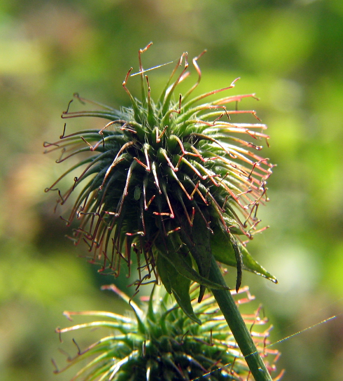 Geum urbanum Ungheni, Argeş, România